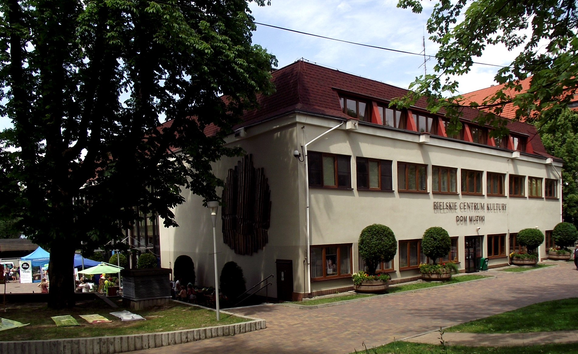 Bielskie Centrum Kultury - Dom Tańca